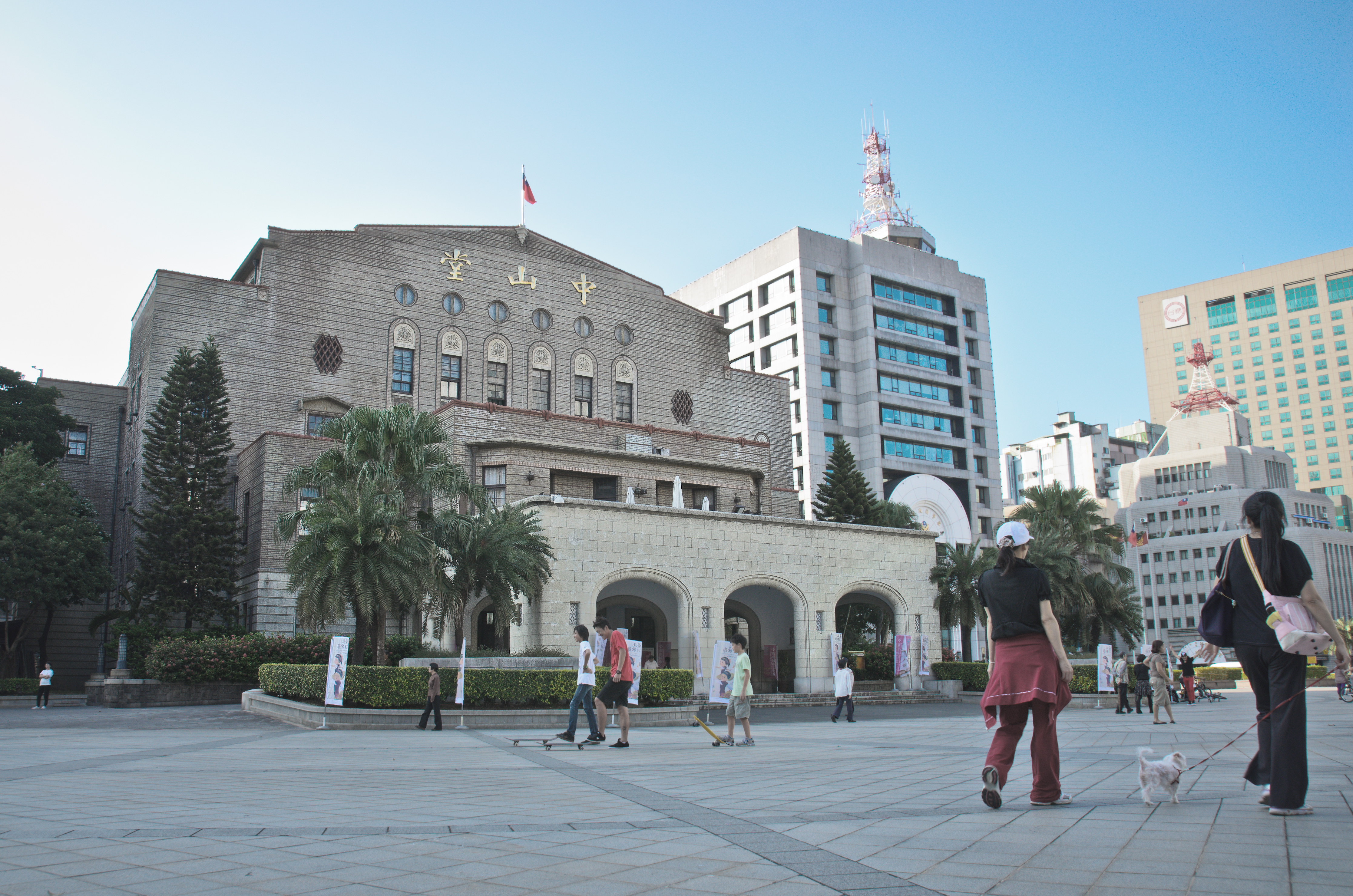 臺北市中山堂、臺北市政府警察局總局。